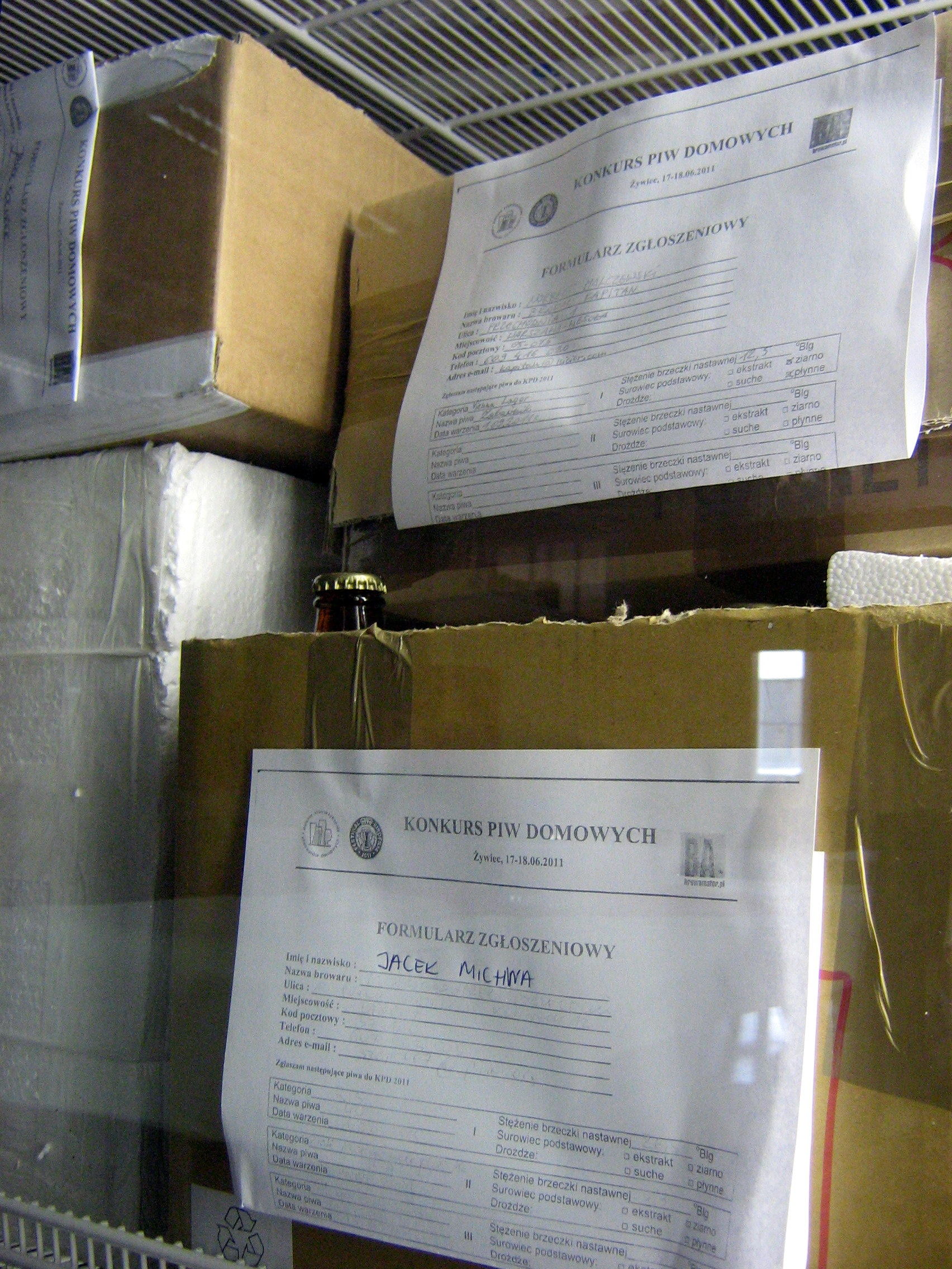 Zgłoszone piwa do konkursu przechowywane w lodówce